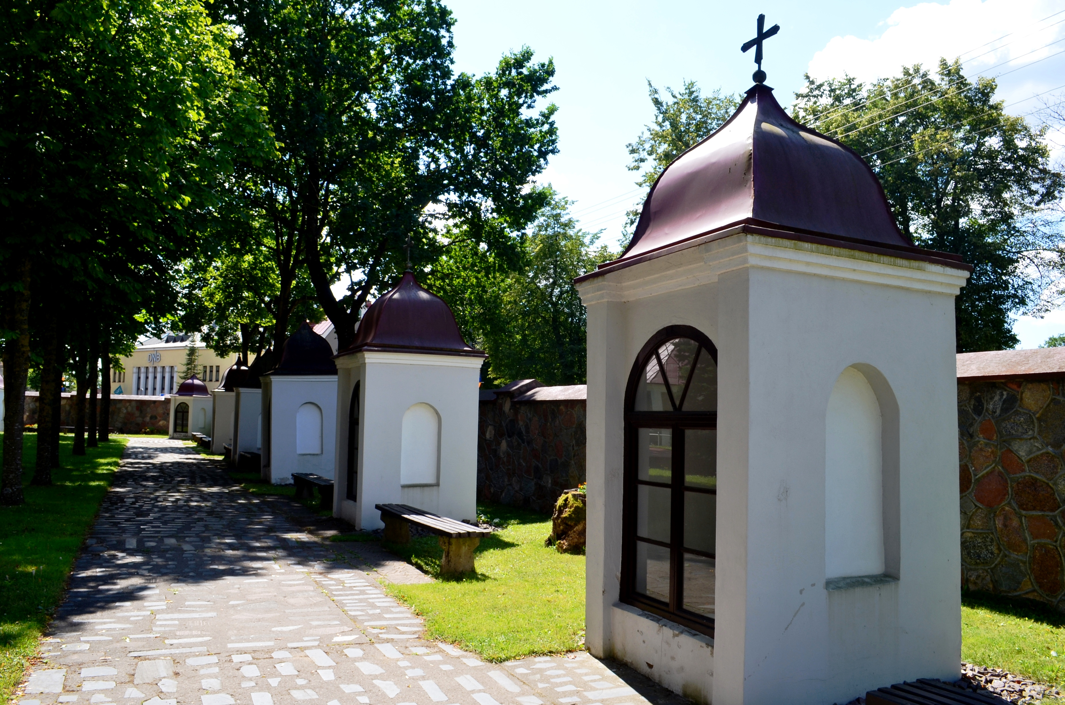 Kretingos bažnyčios kalvarijos